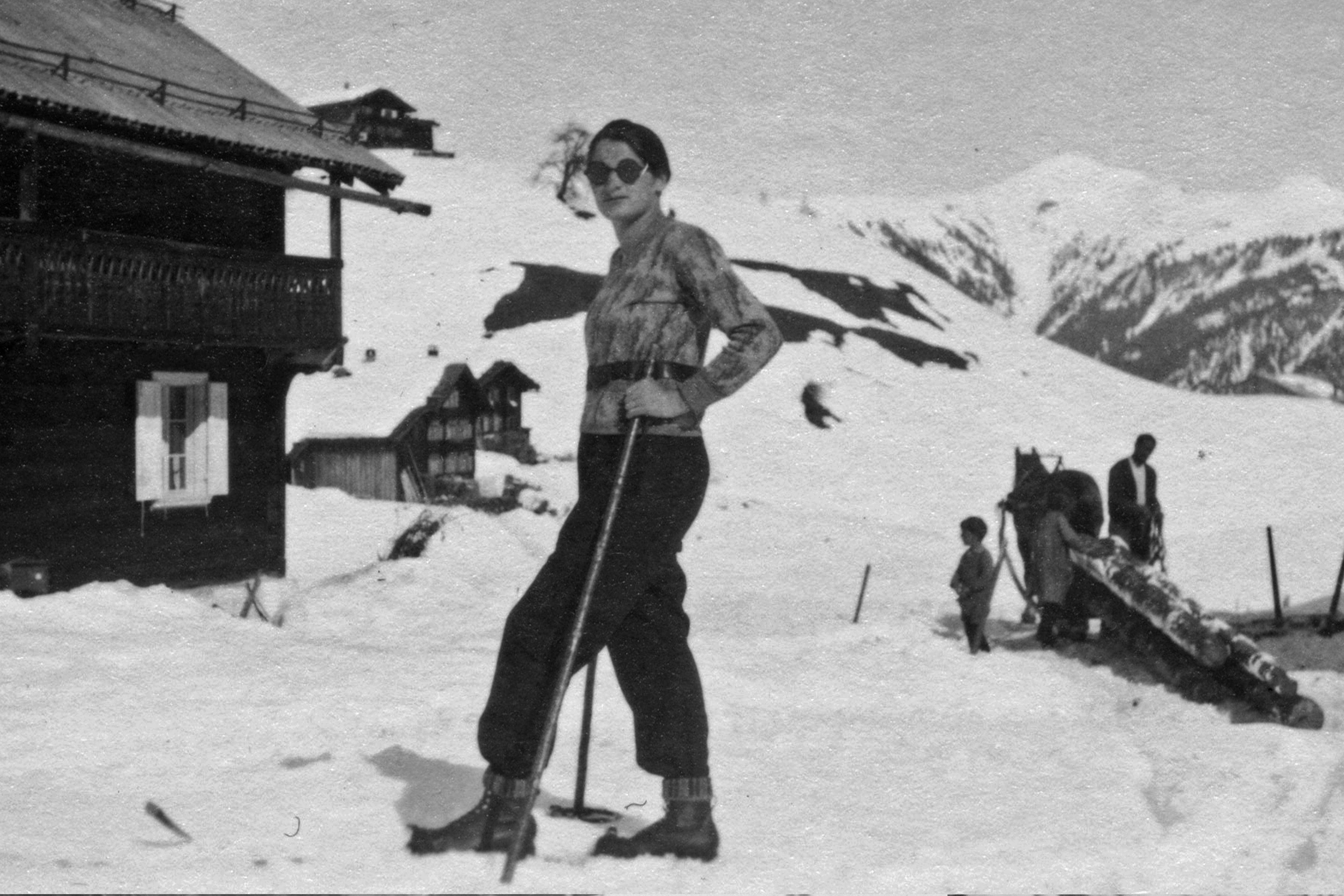 Greti Caprez-Rofler (1906–1994) war 1931 die erste Pfarrerin der Schweiz, die alleinverantwortlich eine Gemeinde (Furna GR) betreute. Das Foto zeigt sie auf Skiern in dem Bündner Dorf, das erst 1968 ans Stromnetz angeschlossen wurde.